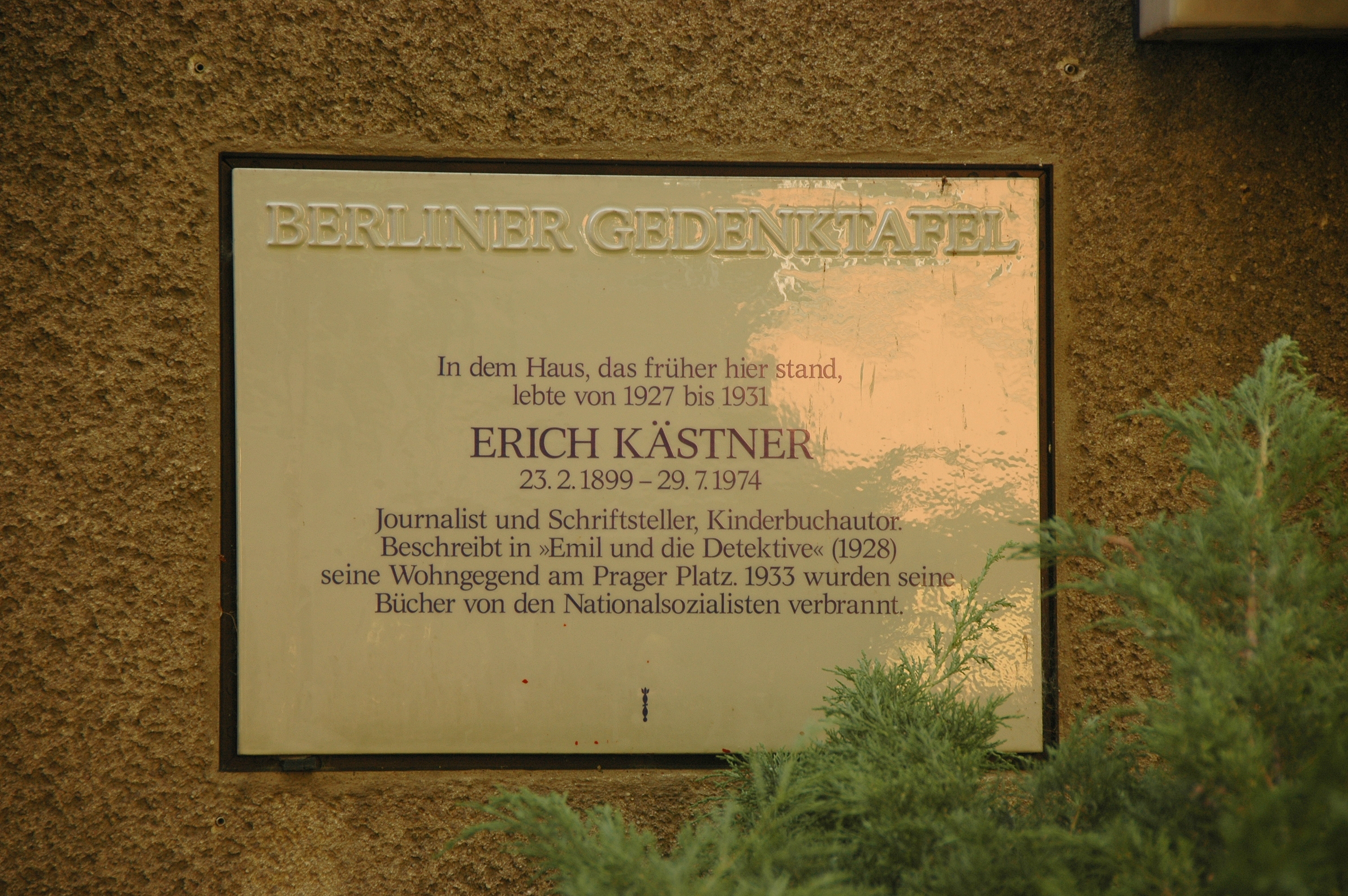 Gedenktafel an dem früheren Wohnhaus Erich Kästners in Berlin-Wilmersorf